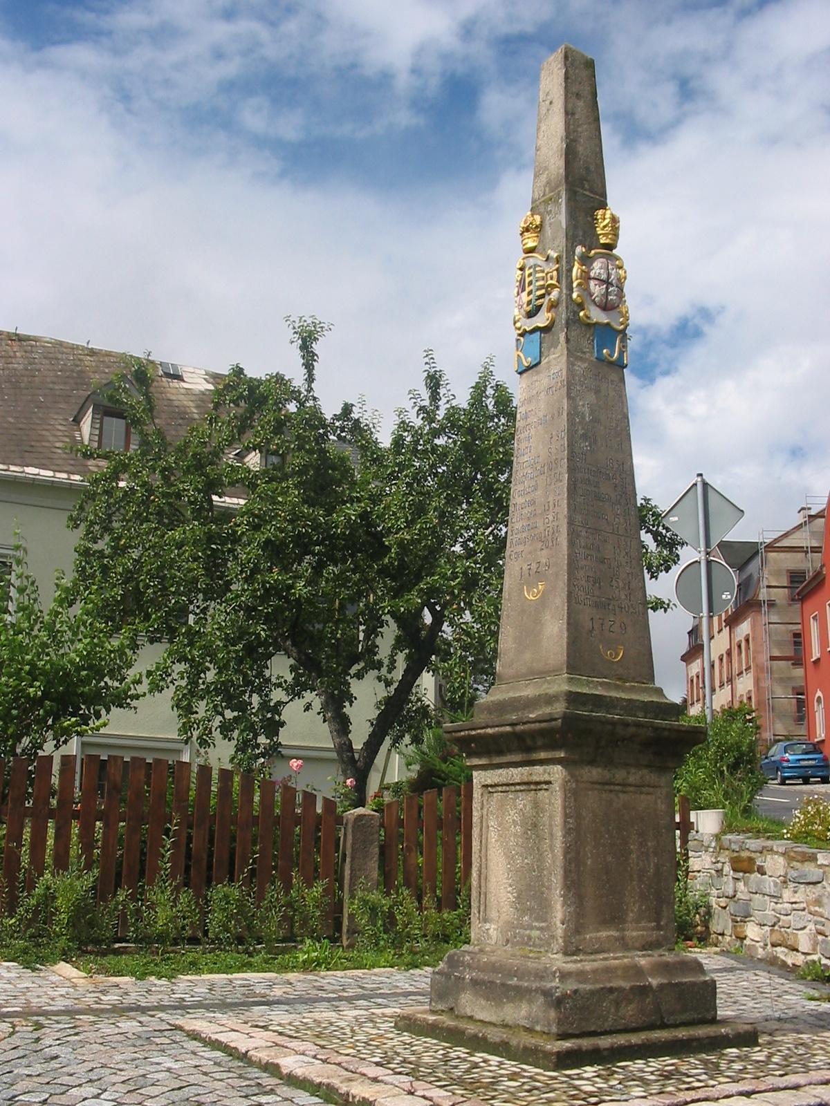 Kursächsische Postmeilensäule in Elterlein (Erzgebirge).